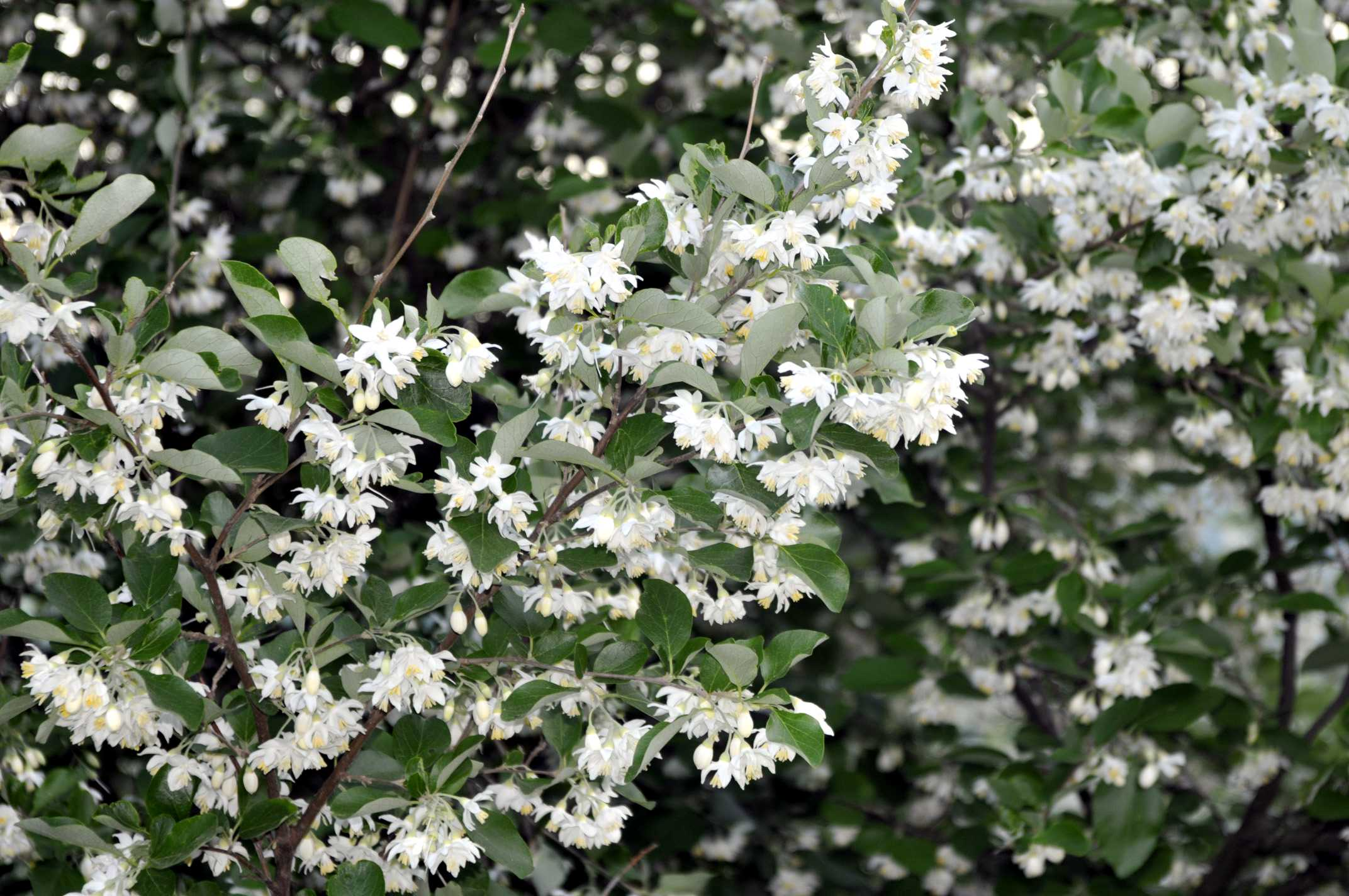 Fioritura di Styrax officinalis nel territorio del comune di Marcellina (Rm) all'interno del Parco Naturale Regionale dei Monti Lucretili.